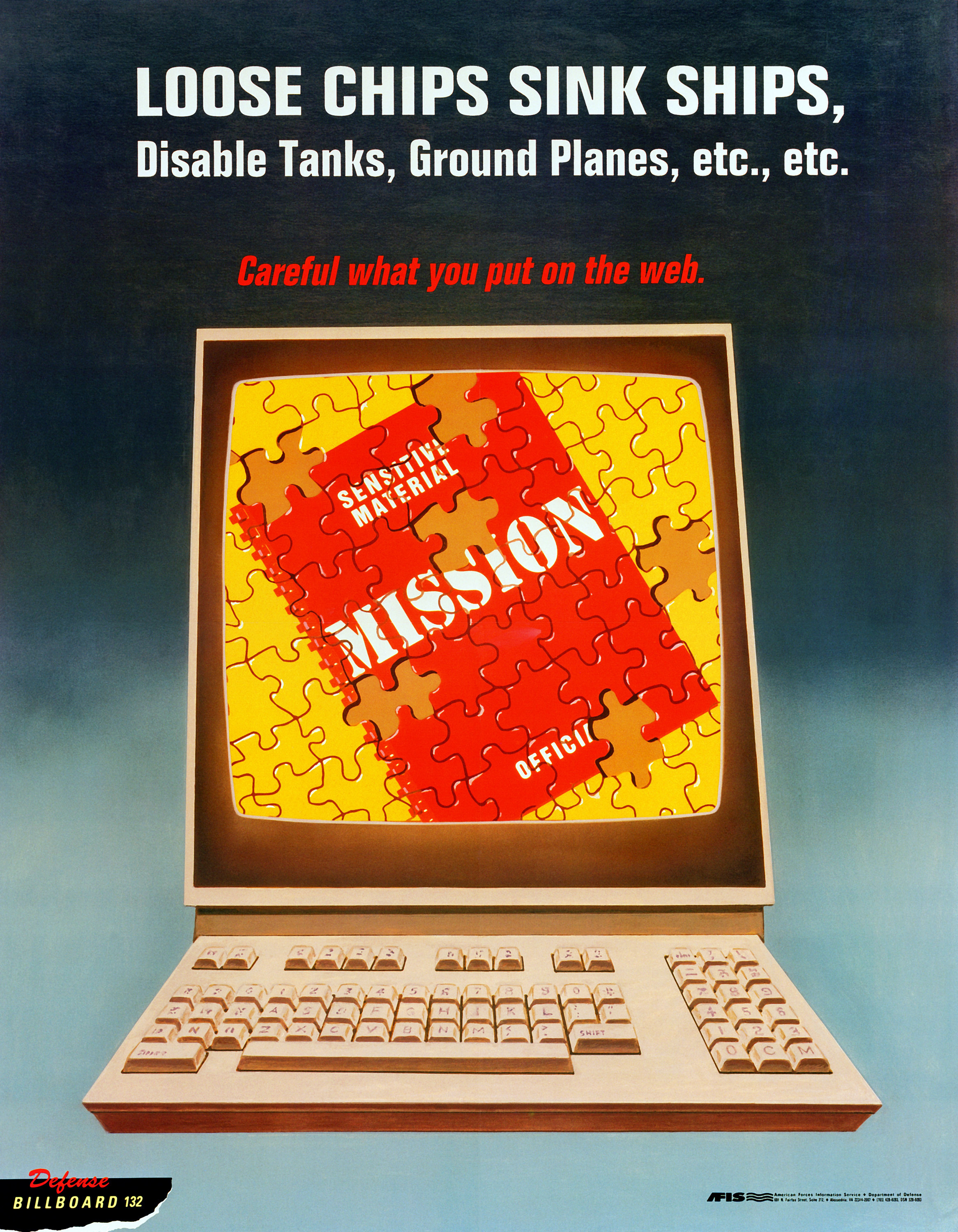 AFIS BILLBOARD POSTERS. WEB SECURITY. DEFENSE BILLBOARD #132